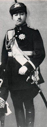 Mohammad Hassan Mirza